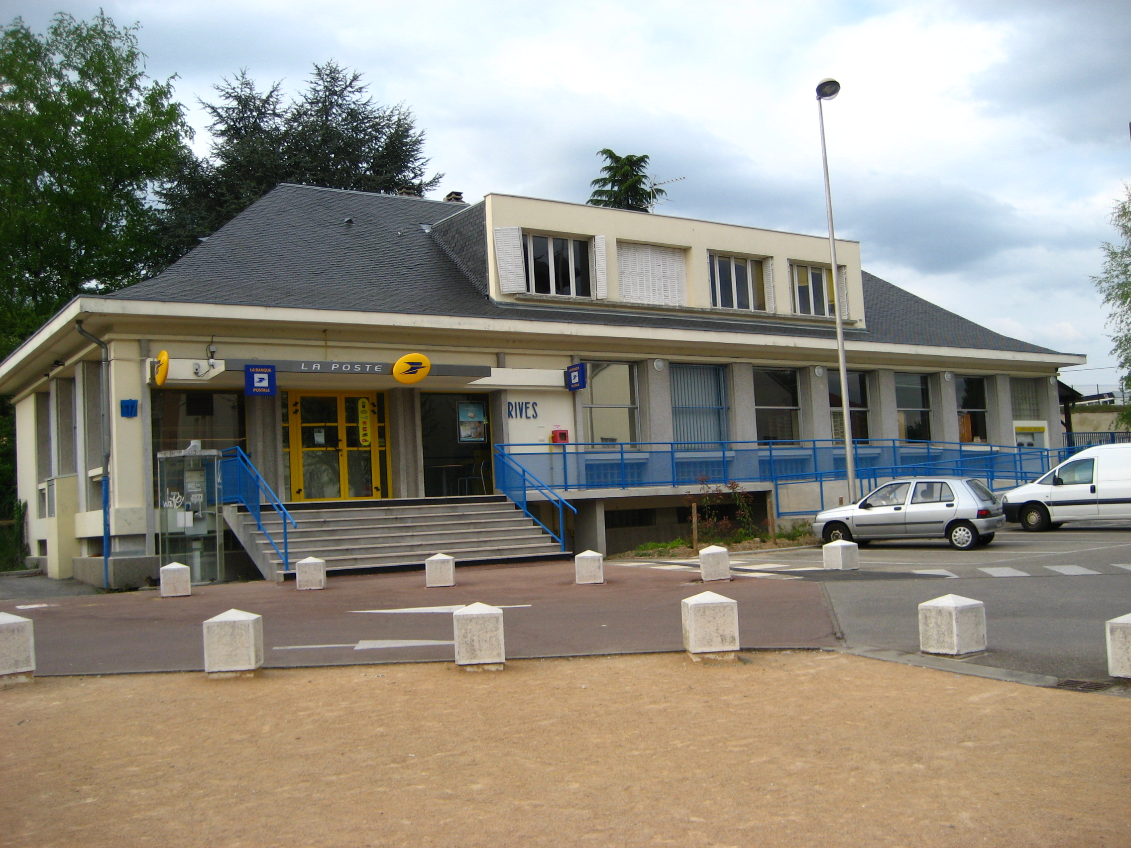 La poste de Rives / Rives, Isère, France